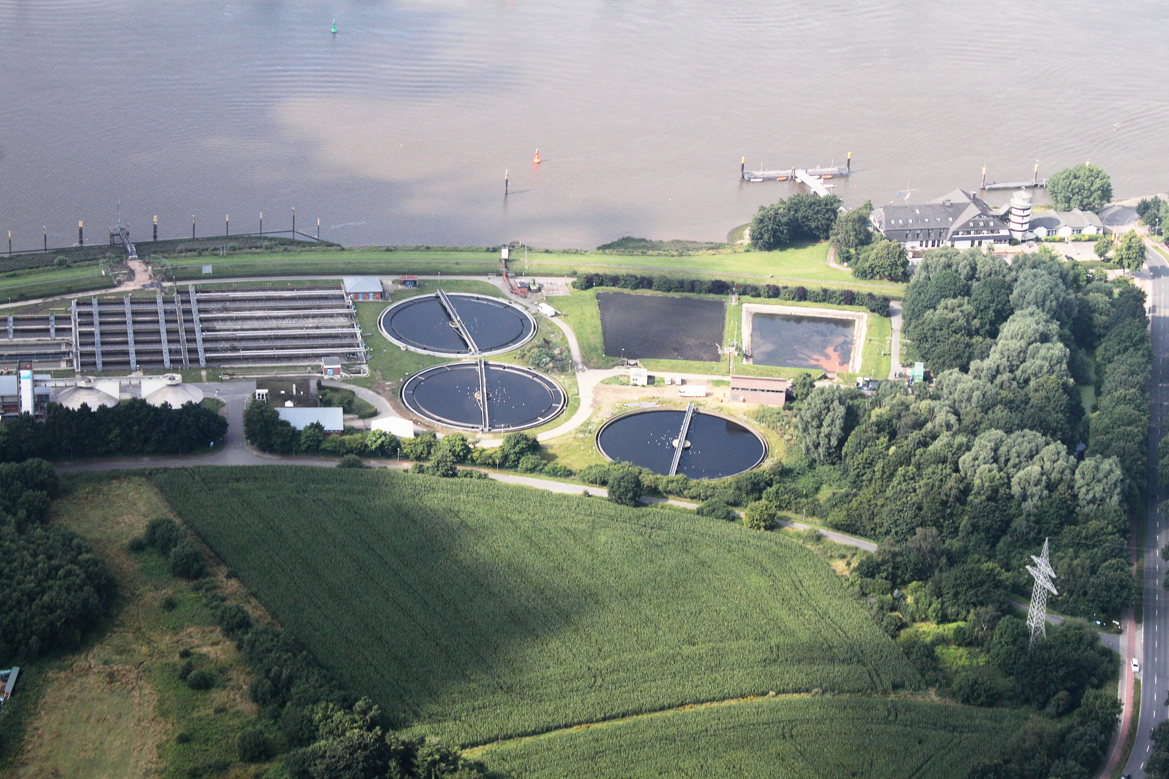 Fotoflug Bremen; Flughöhe 500 m; von der Autobahnabfahrt der A 27 in Bremen-Nord über Vegesack zum U-Boot Bunker Valentin: Kläranlage Farge